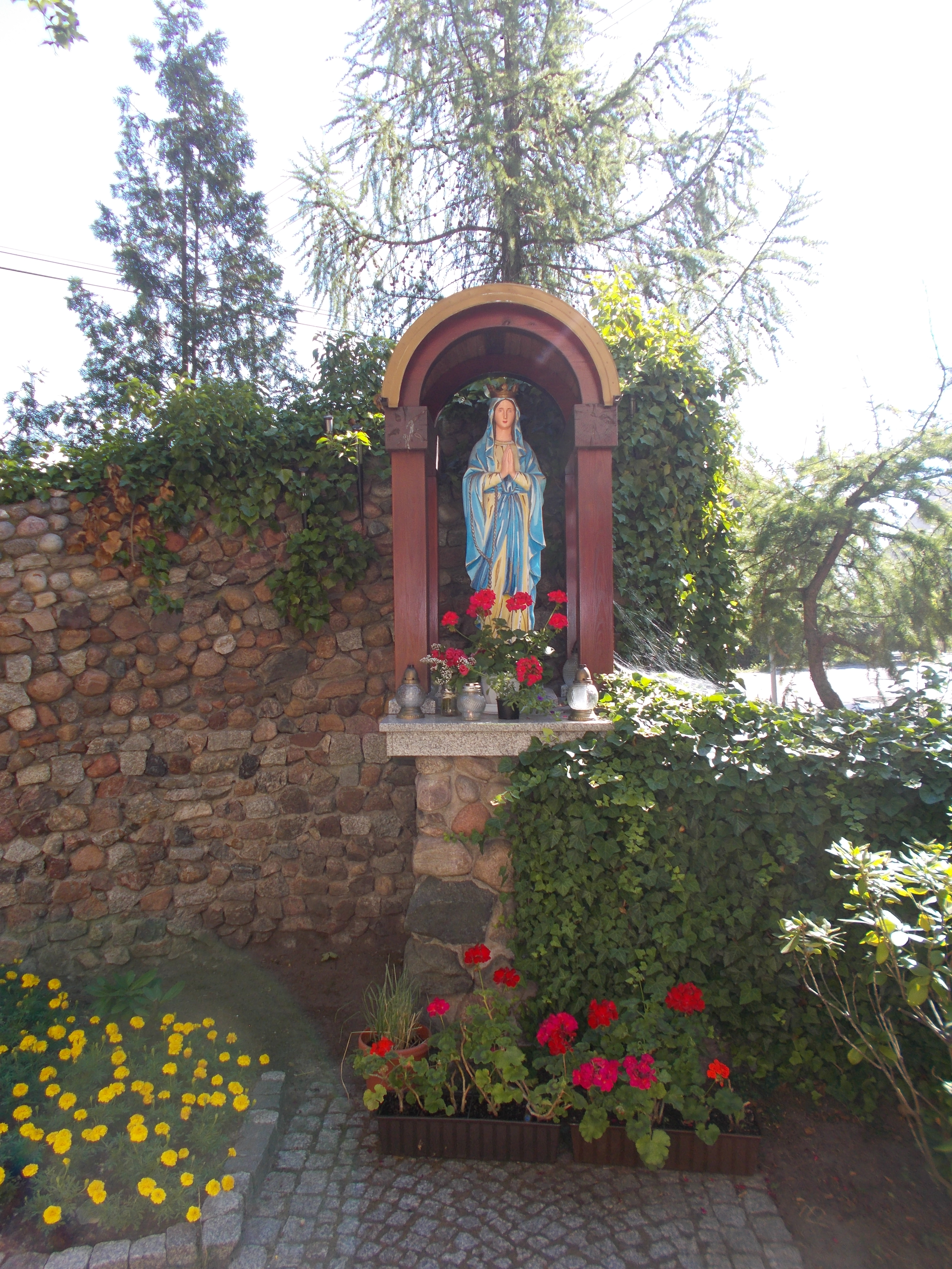 Figura Matki Boskiej przy kościele pw. św. Józefa w Poznaniu.